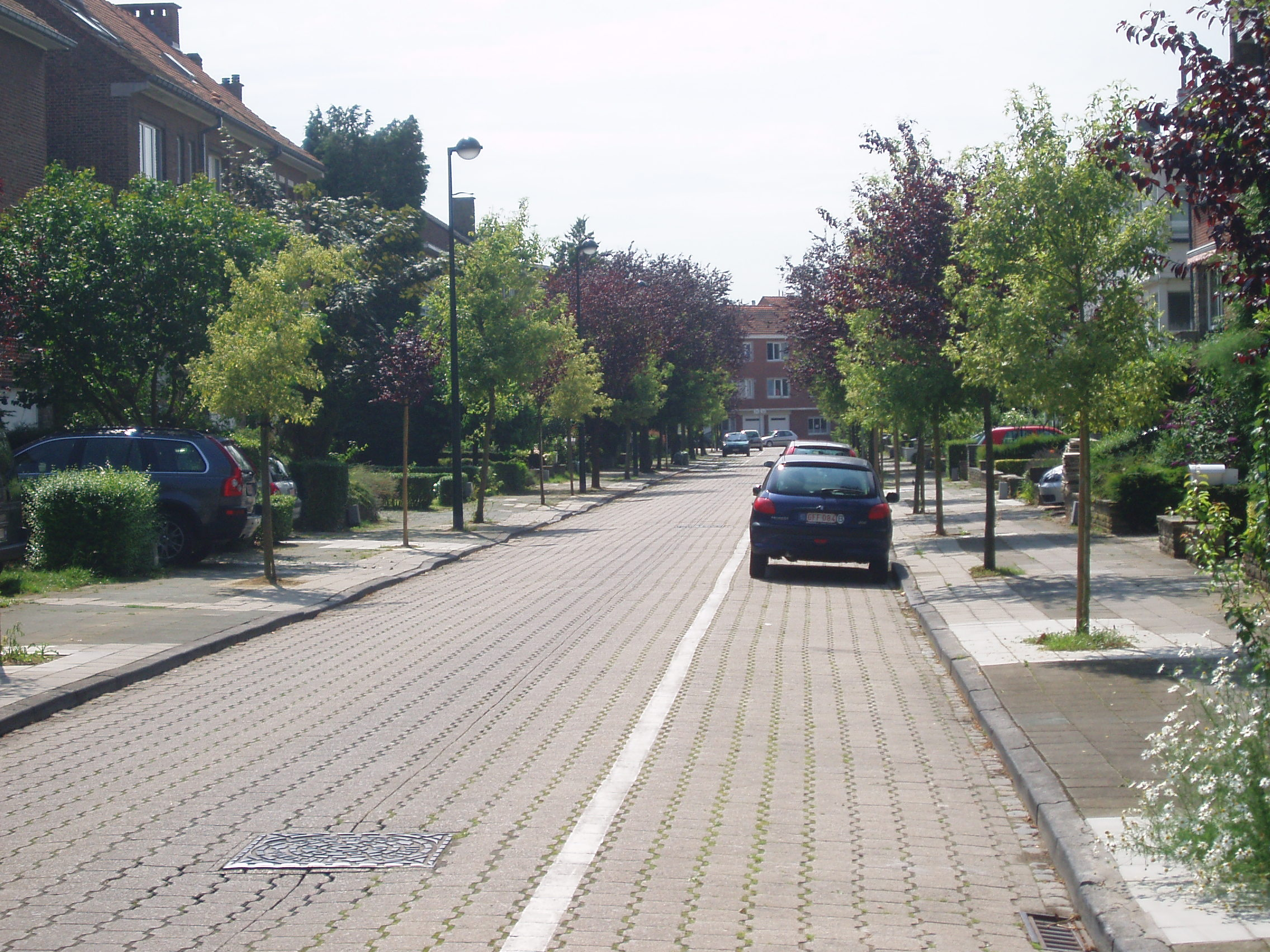 rue Antonius Dewinter Auderghem Belgium